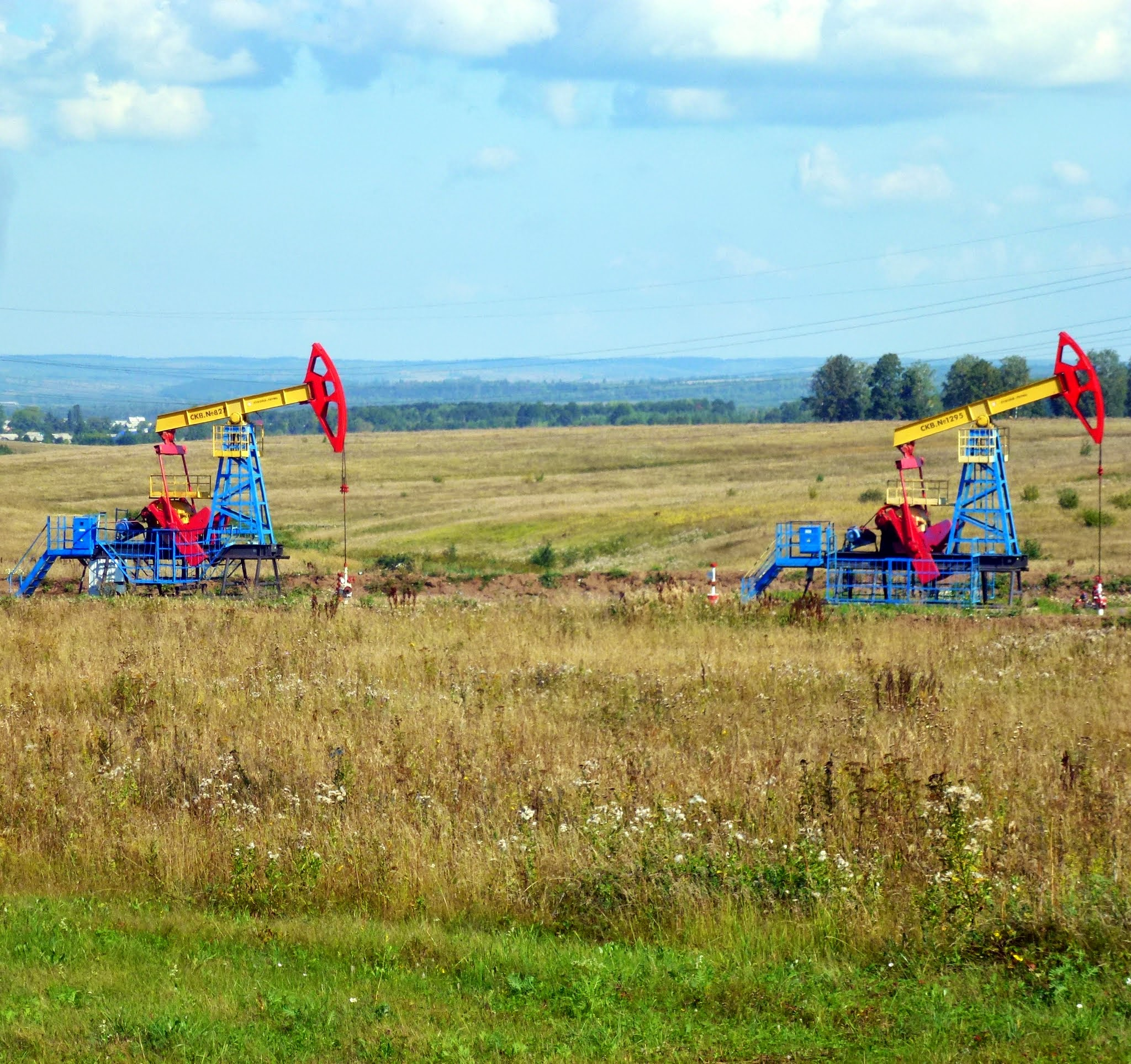 Добыча нефти